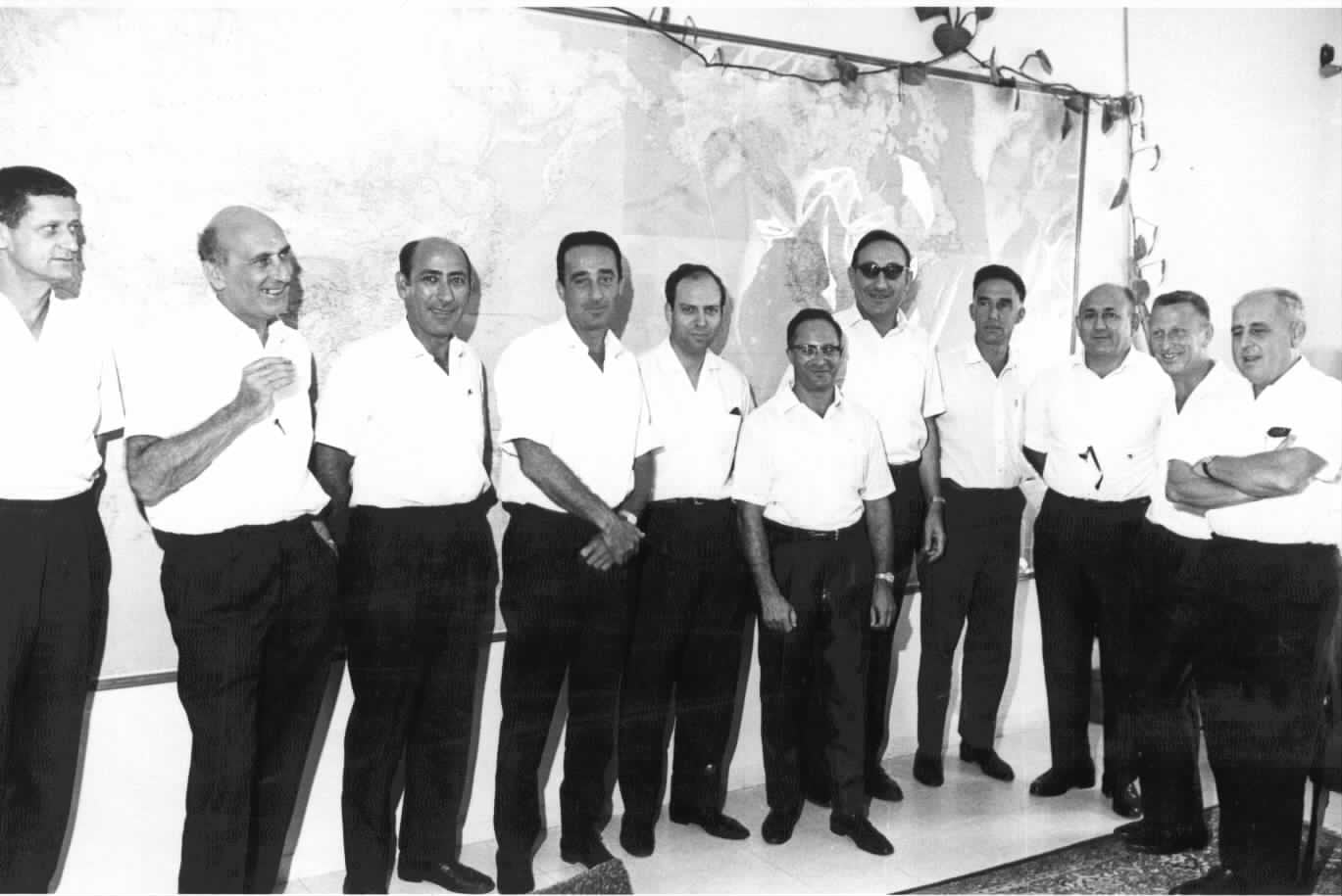 טקס החלפת ראש המוסד. האלוף צבי זמיר החליף את האלוף מאיר עמית. טקס החילופין התקיים בלשכתו של ראש הממשלה דאז, לוי אשכול. בטקס השתתפו שרי הממשלה וראשי אגפי המוסד וסגניהם. בתמונה: ראשי אגפי המוסד למודיעין ולתפקידים מיוחדים וסגניהם. מימין לשמאל: טיבי קידר, נחיק נבות, רחביה ורדי, צבי אהרוני, דוד בר גיורא, נפתלי קינן, אפרים הלוי, מייק הררי, שלום שפי, שלמה כהן, דוד שומרון.